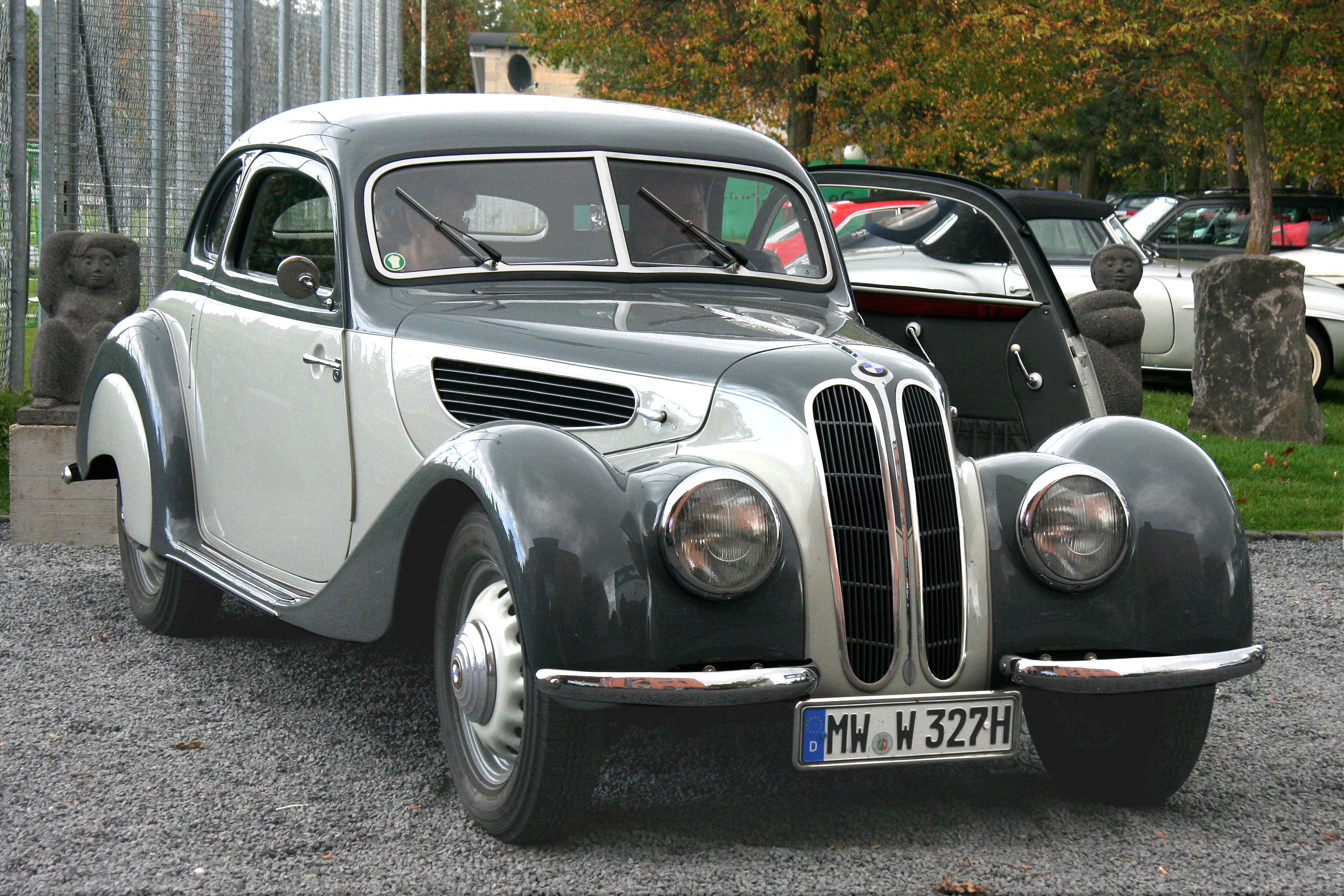 BMW 327 Coupé, Baujahr 1940, in Mendig; 6-Zylinder-Reihenmotor, 1971 cm³, gebaut in zwei Versionen mit 55 PS oder 80 PS; 1606 Cabriolets und 265 Coupés wurden von 1937 bis 1941 hergestellt